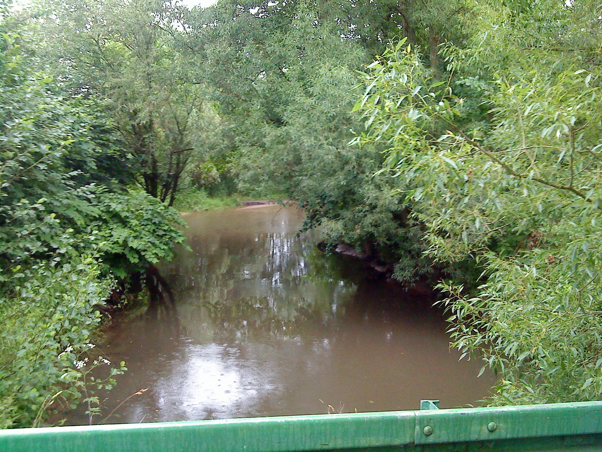 Die Aschaff kurz vor ihrer Mündung in den Main bei Mainaschaff